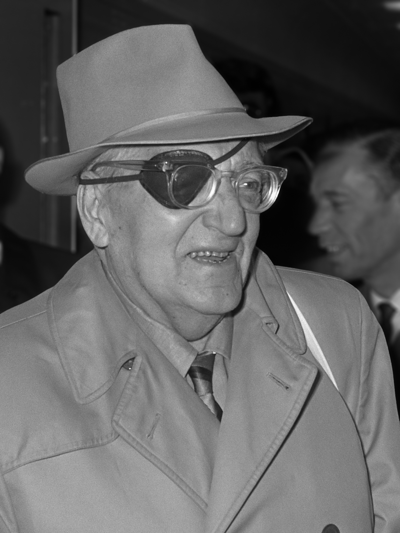 Filmregisseurs Fritz Lang ( 79 jaar ) arriveert op Schiphol 10 april 1969